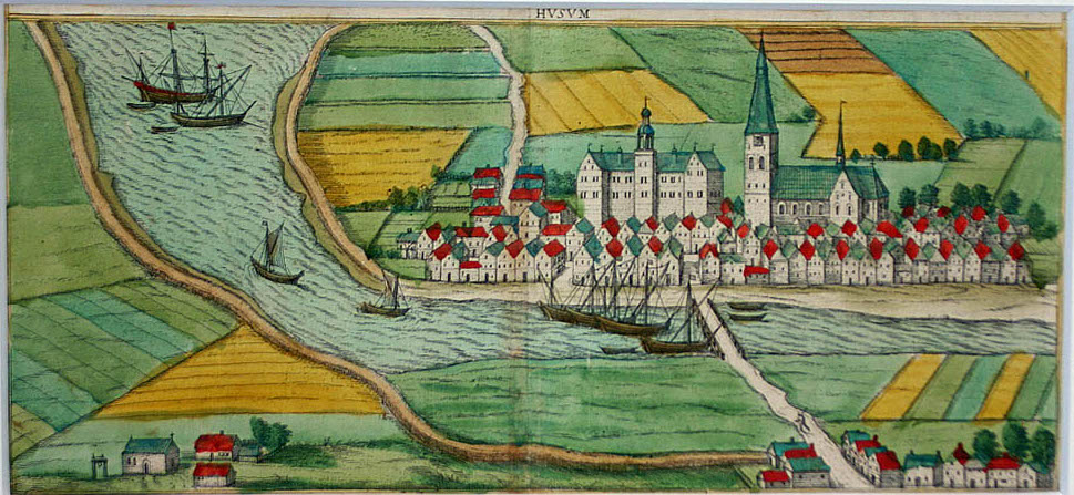 Husum, 1598, 17,8x38,5cm, koloriert